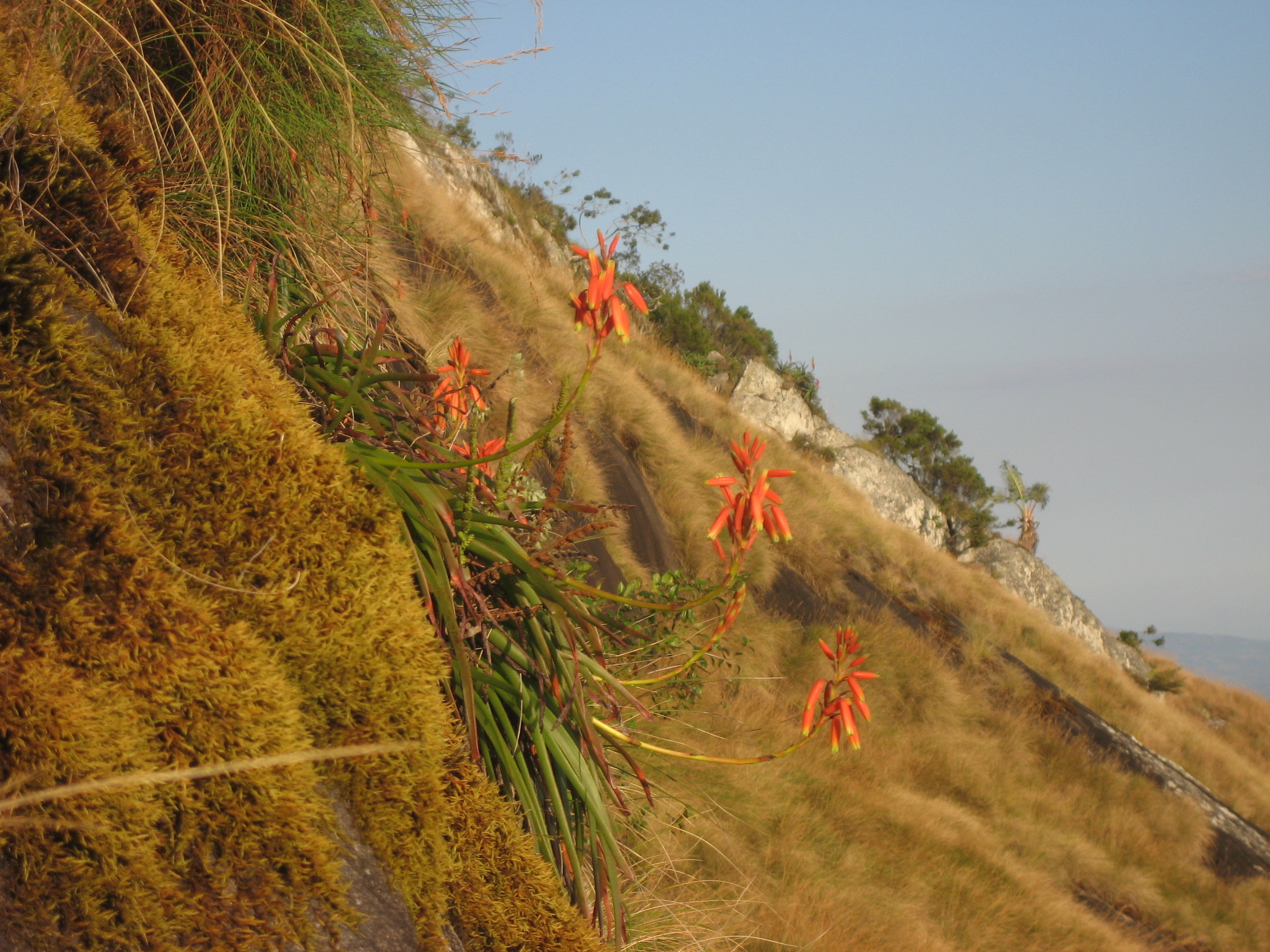 Aloe inyangensis - Plant - Gurungue